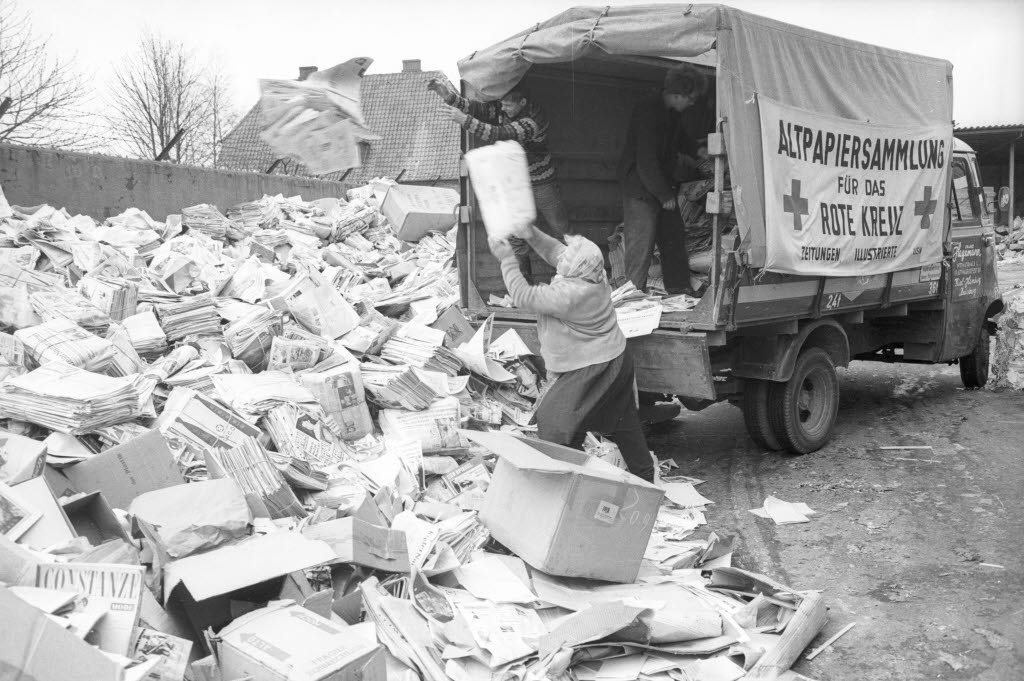 Durch Firma Franz Hagemann.